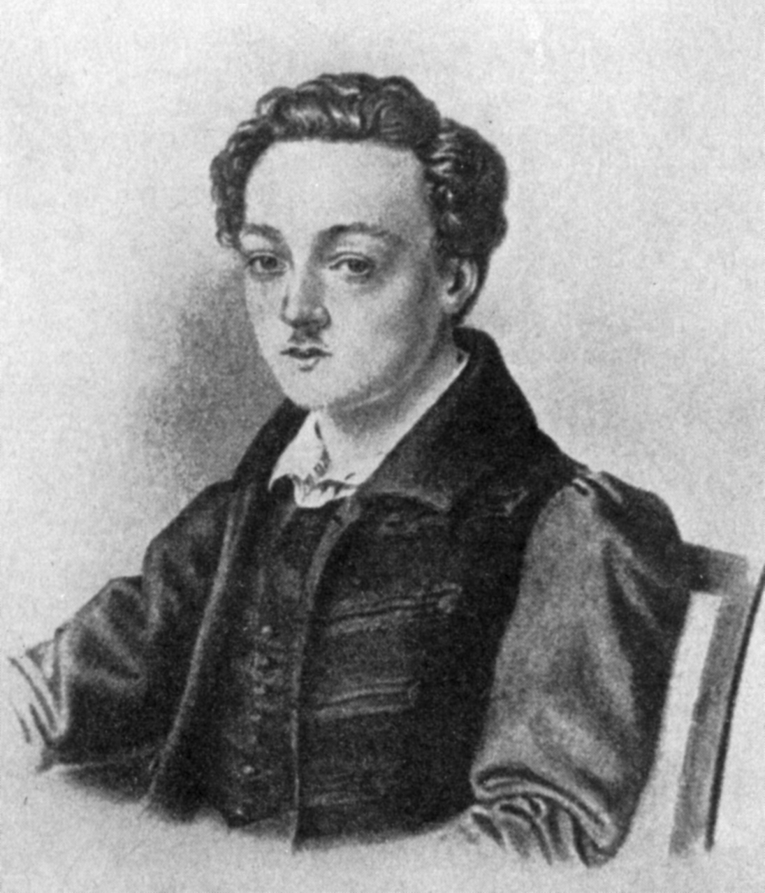 Porträt von Georg Büchner, undatierte Bleistiftzeichnung des Darmstädter Theatermalers Philipp August Joseph Hoffmann (1807 bis 1883) , das Original ist 1944 verbrannt